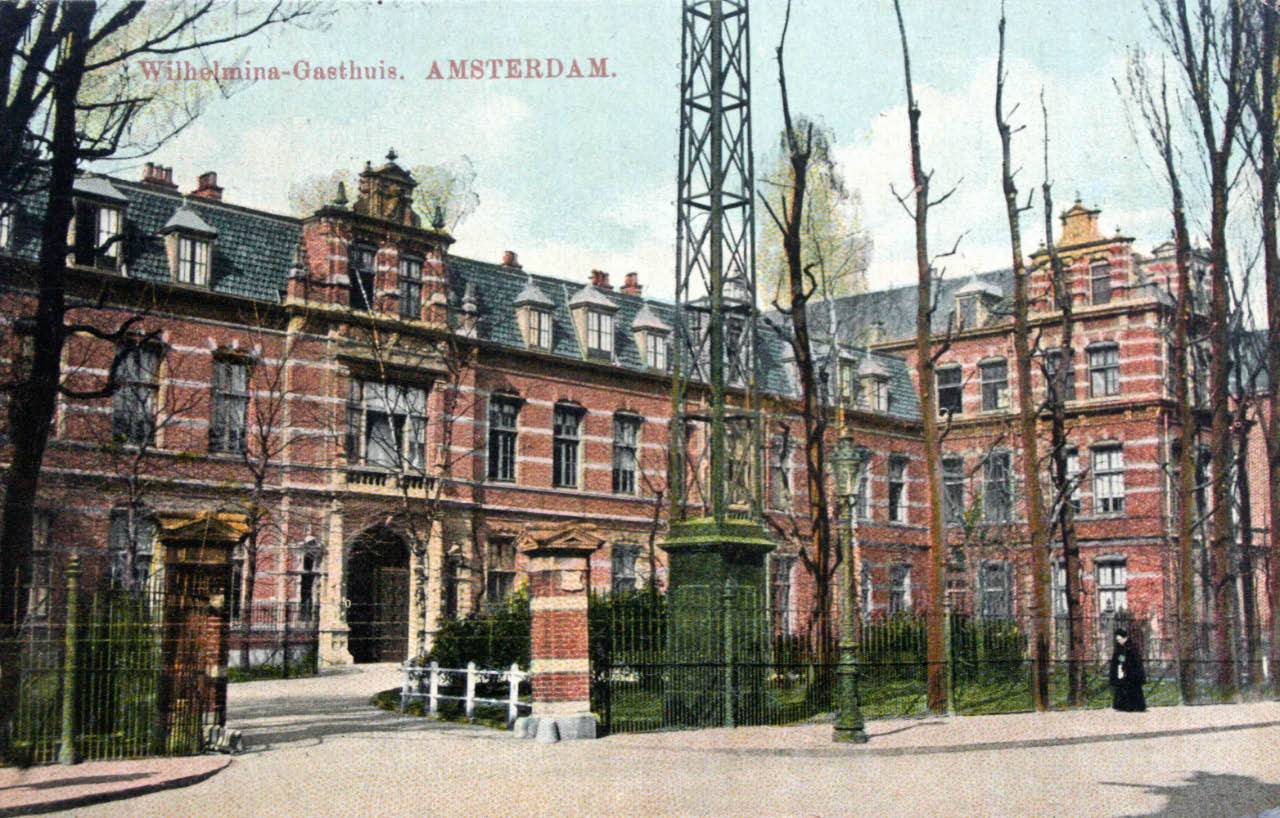 1ste Helmersstraat - Wilhelmina Gasthuis (ansichtkaart, kleur).